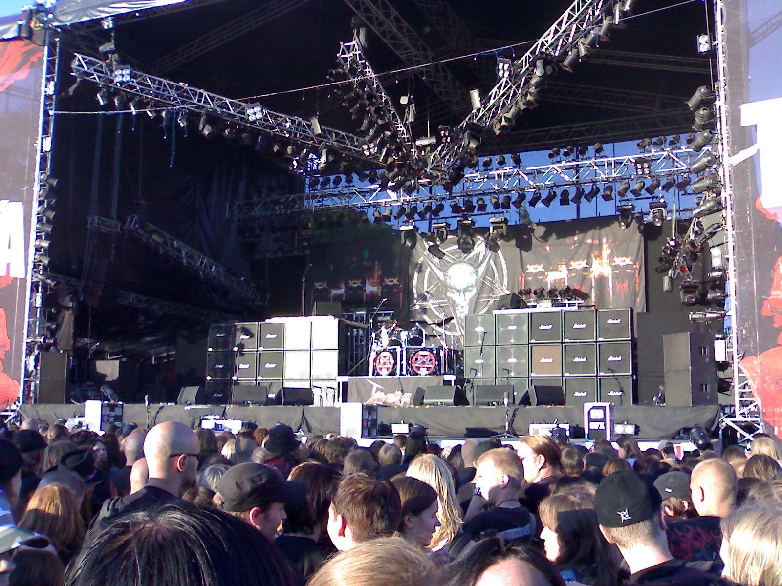 Escenario del Tuska Open Air 2006 preparado para la actuación de Venom